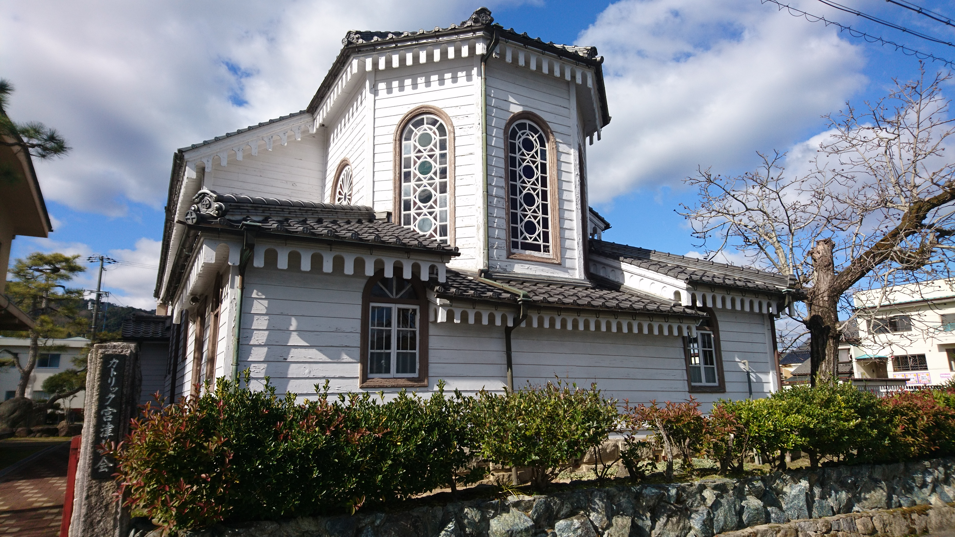 カトリック宮津教会の東側